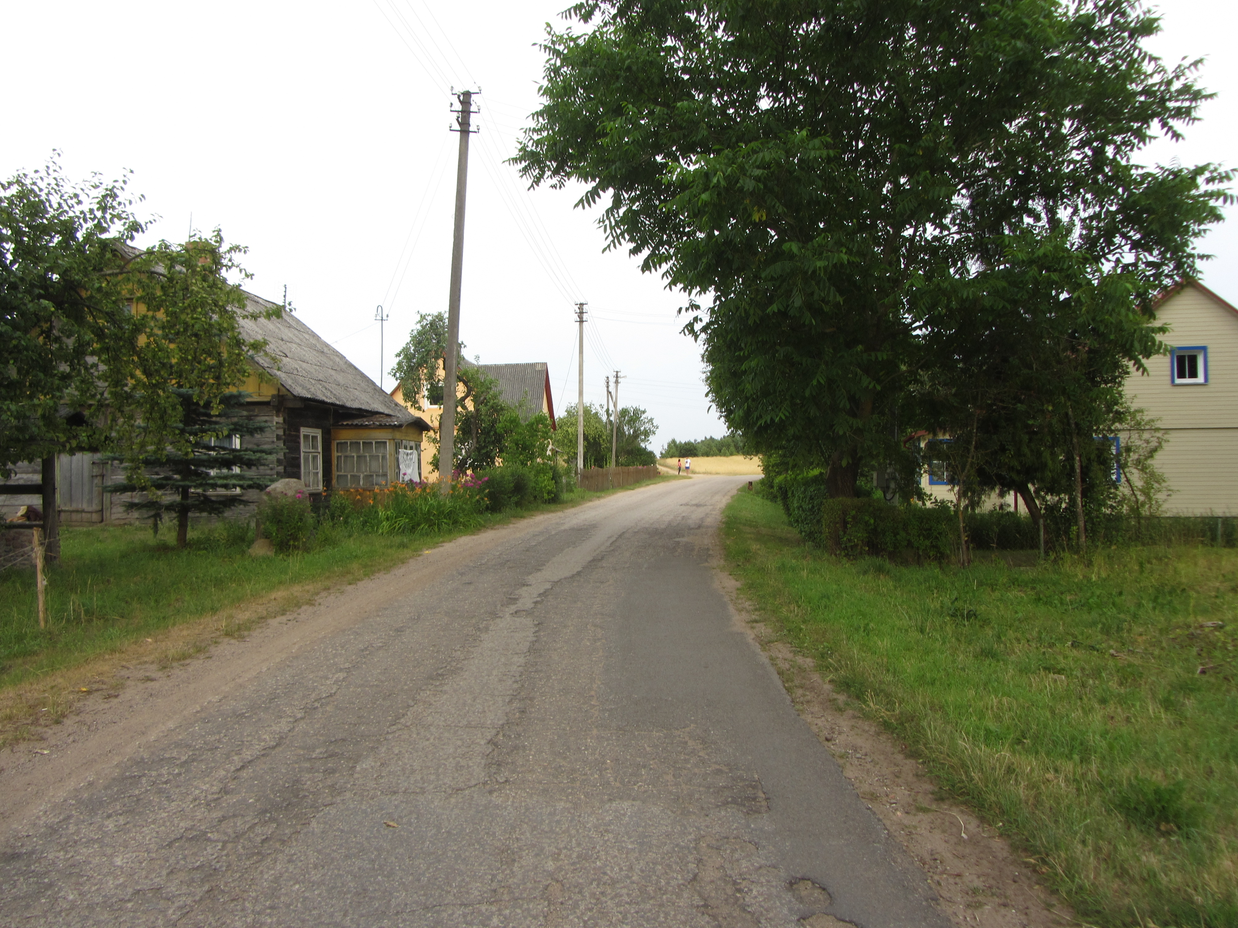 Viktarinas, Lithuania